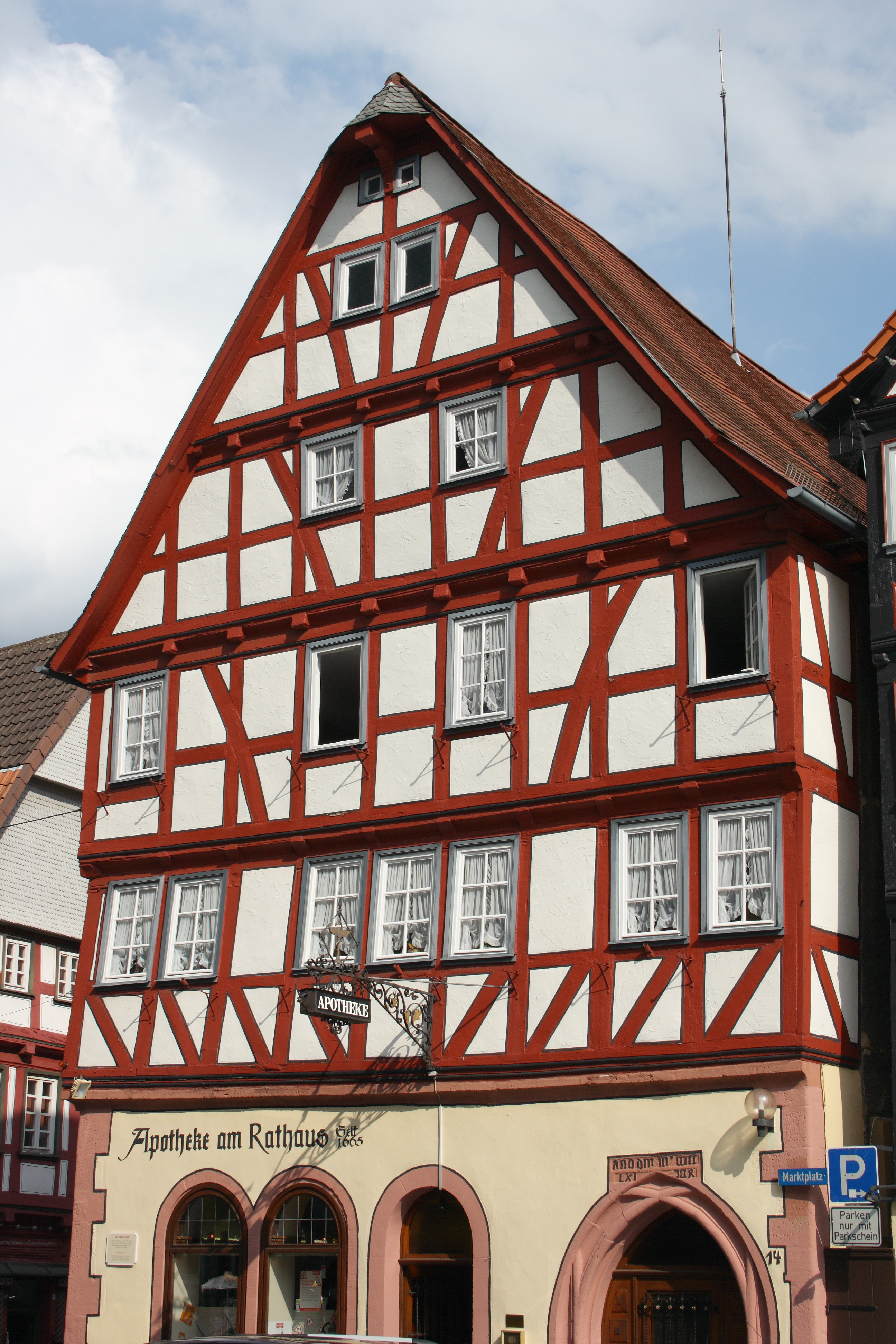 Apotheke am Rathaus in Alsfeld im Vogelsbergkreis (Hessen), Markt 14